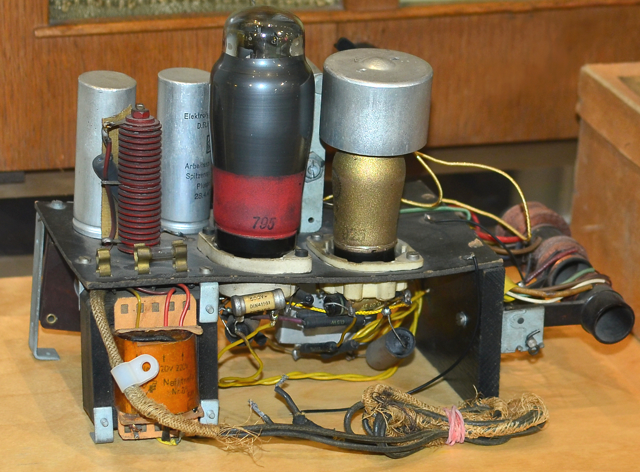 GLAM im Deutschen Museum Bonn, Bausatz, Bauteile des Heinzelmannradios